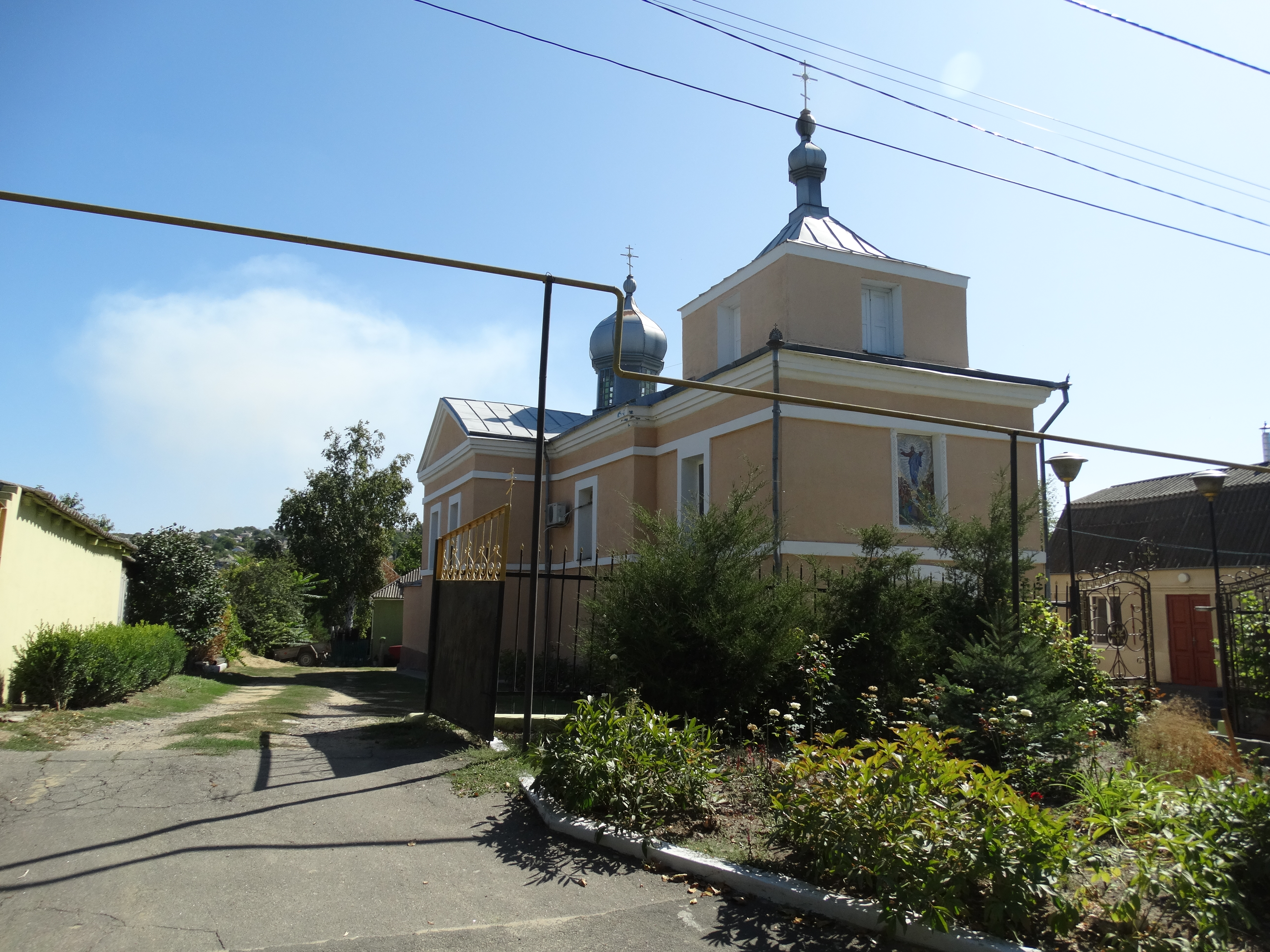 Вознесенська церква у смт Окни, Одеська область. Вікіекспедиція на північ Одещини